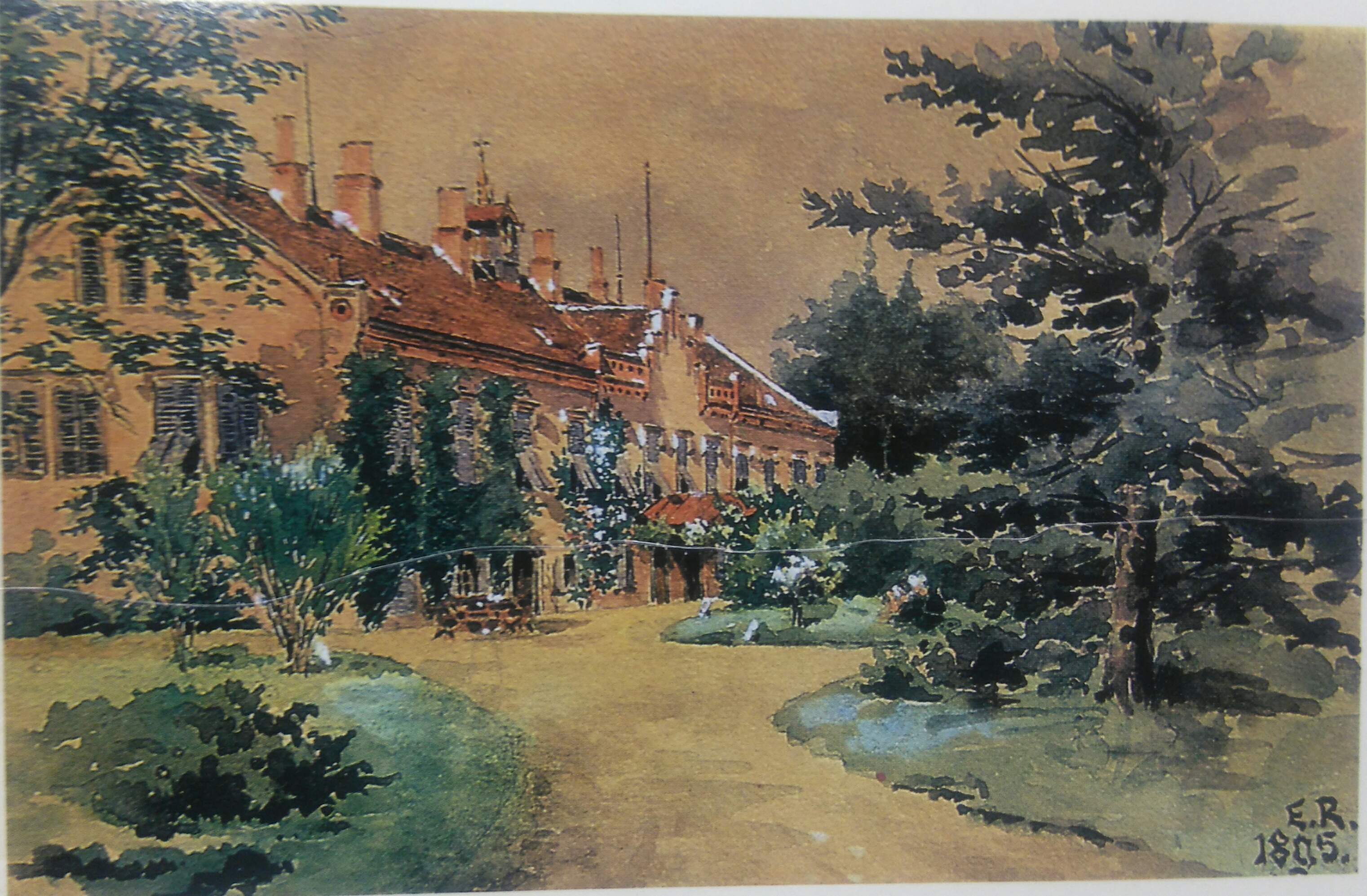 Akvarel autorice Elze Ramberg iz 1895. godine.